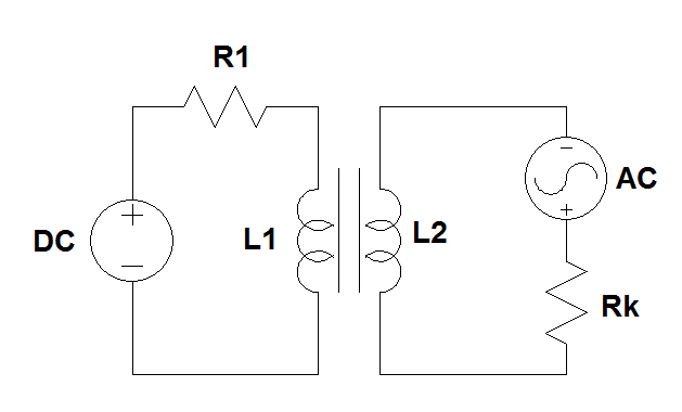 Lihtsaim magnetvõimendi skeem.